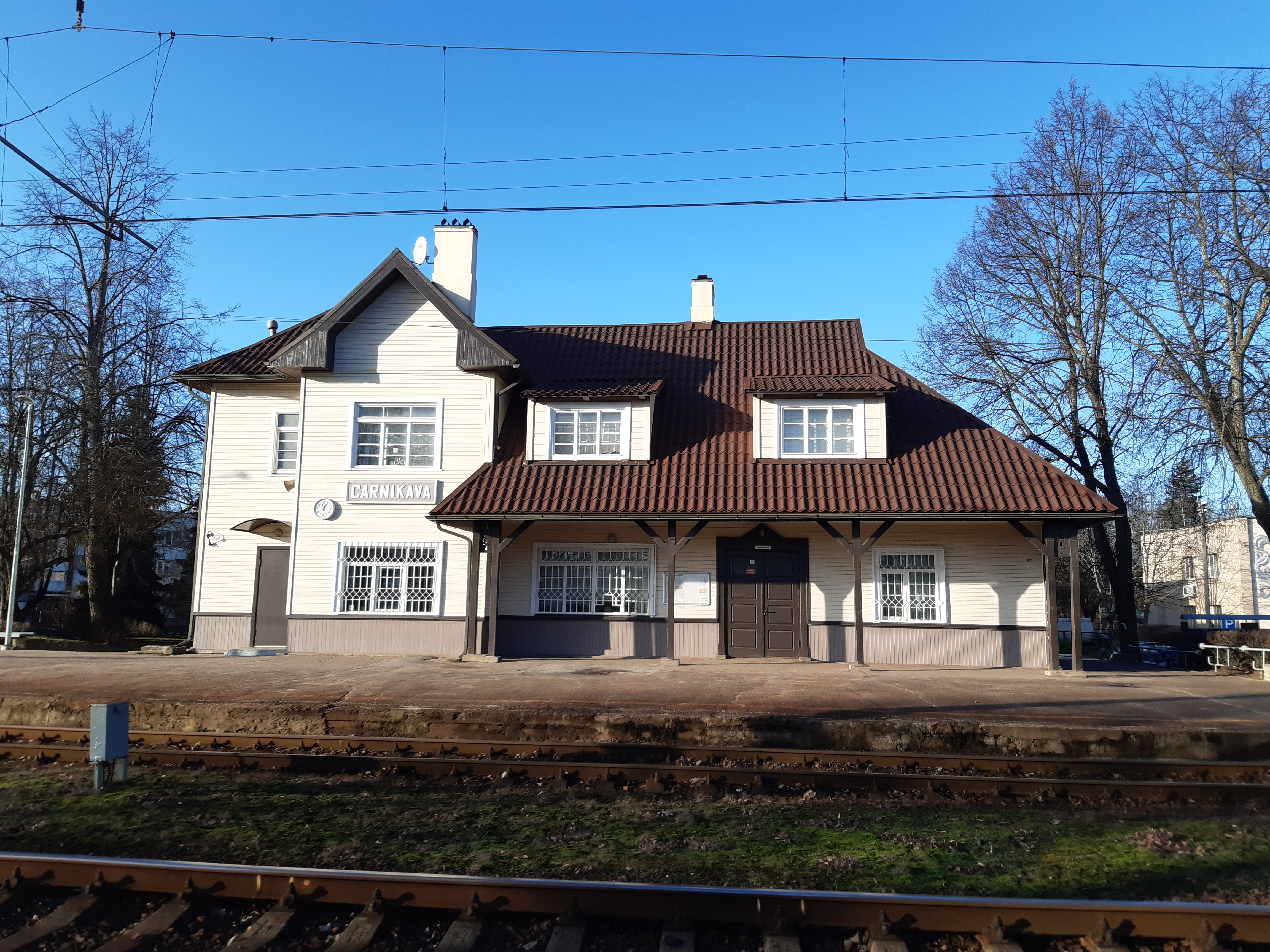 Carnikavas dzelzceļa stacija 2020. gadā.